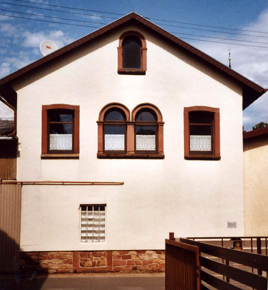 Ehemalige Synagoge Göcklingen; Hinterhaus zu Schulstraße 17 in der Heuchelheimer Straße